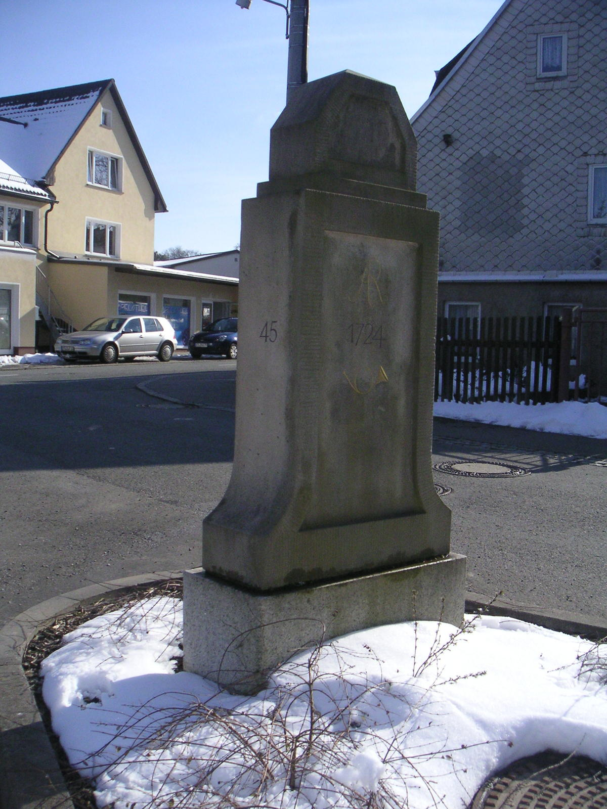 Viertelmeilensäule (1724) Nr. 45 in Zwönitz an der Straße nach Dorfchemnitz